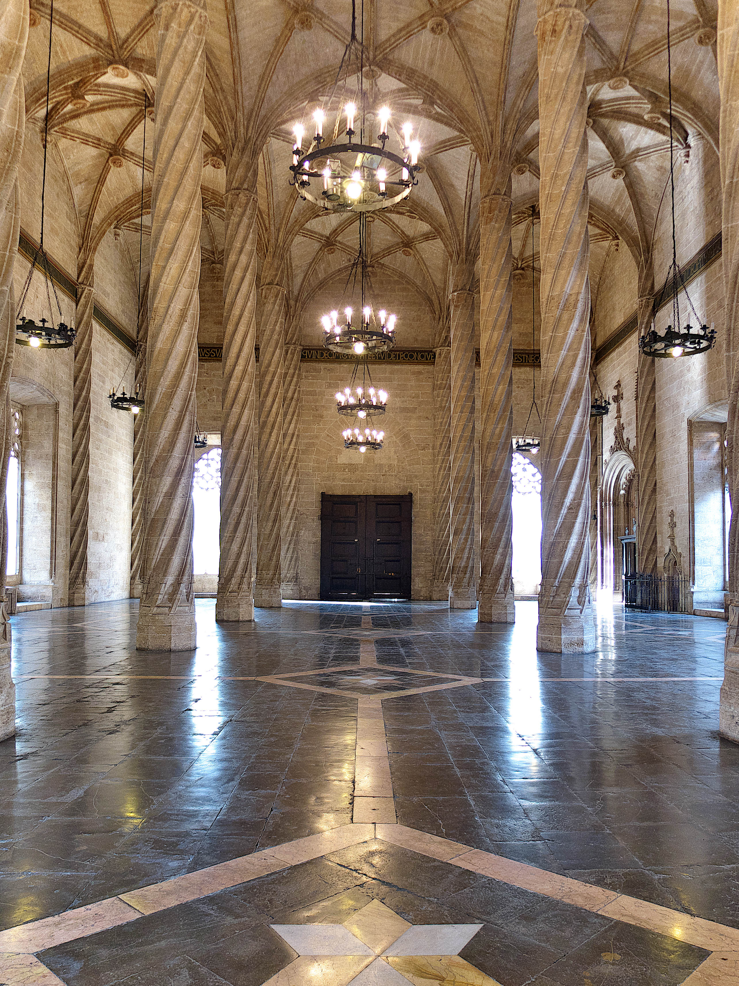 Nave central de la Sala de Contratación (s. XV)